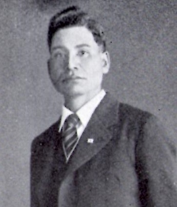 喜多章明『アイヌ果たして亡びるか？』の中の写真。 北海道白老ウタリ協会･発行 昭和12年10月10日発行